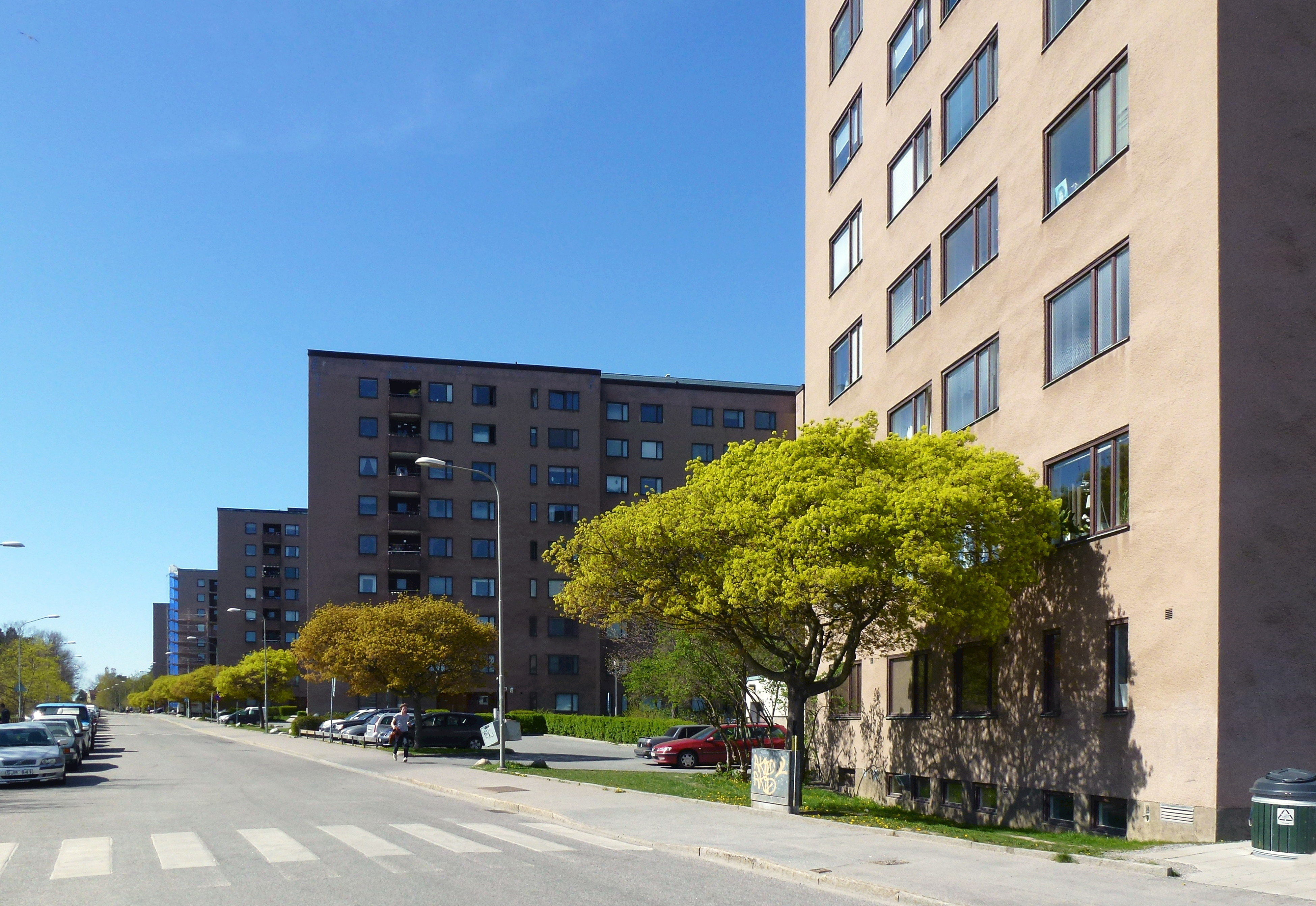 Bostadshus längs Selmedalsvägen i Axelsberg, byggda 1965 - 1971, arkitekt Ancker-Gate-Lindegren